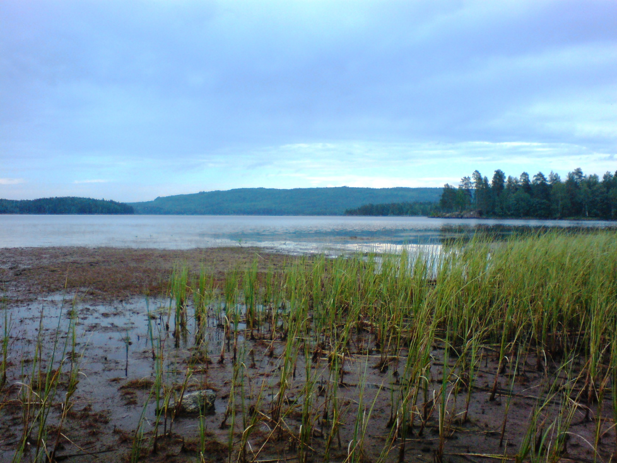 Mangen(sjøen) sett fra Søndre Mangen.